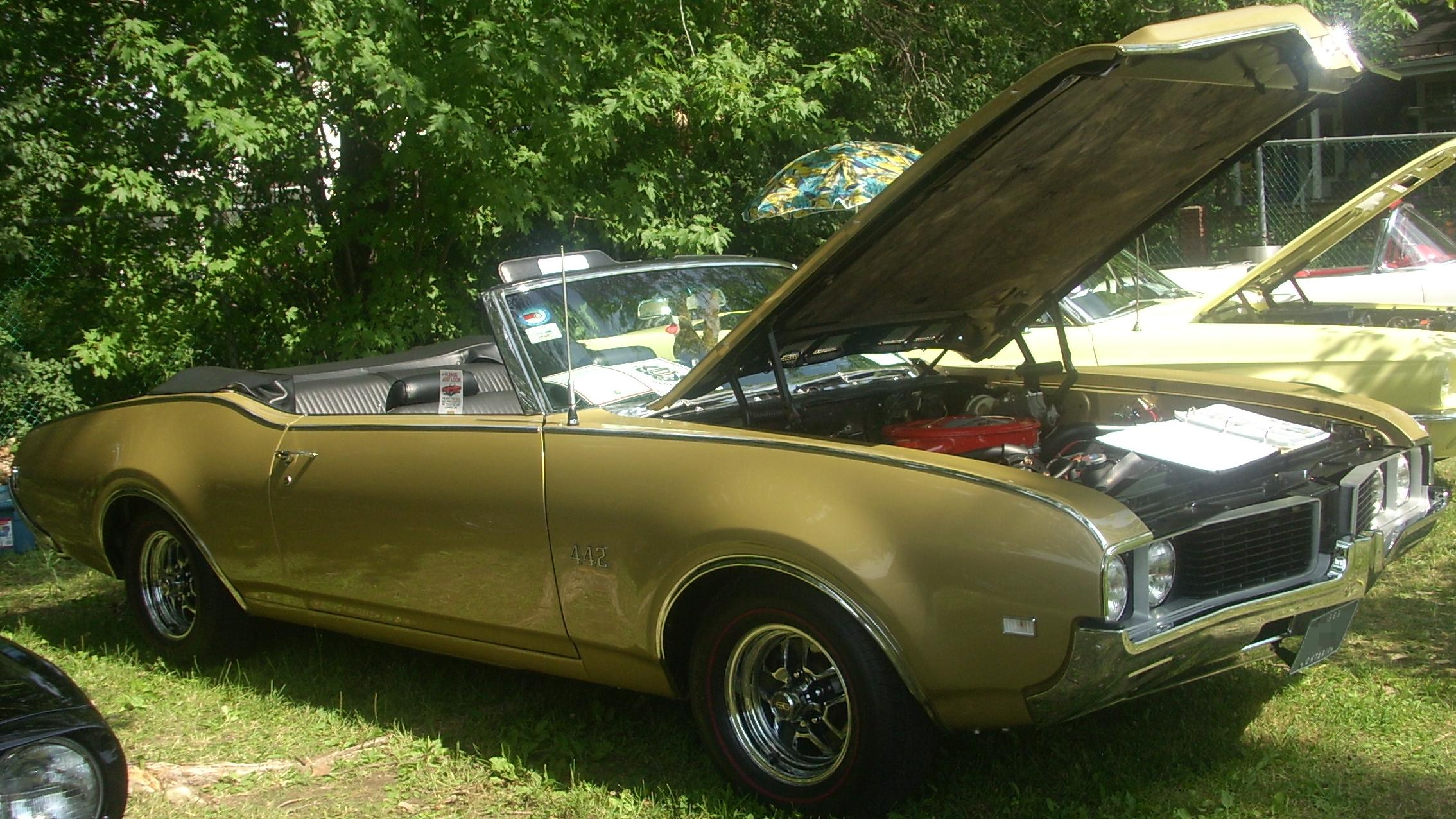 1969 Oldsmobile 442 photographed in Laval, Quebec, Canada at Auto classique Laval 2010.